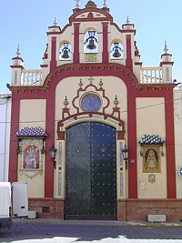 Ermita de Nuestra Señora de Roncesvalles (Antiguo hospital de San Sebastián) de siglo XIX. En ella destacan esculturas de los siglos XVI y XVIII.